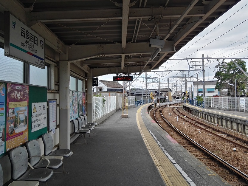 Kira Yoshida station platform for Nishio Line